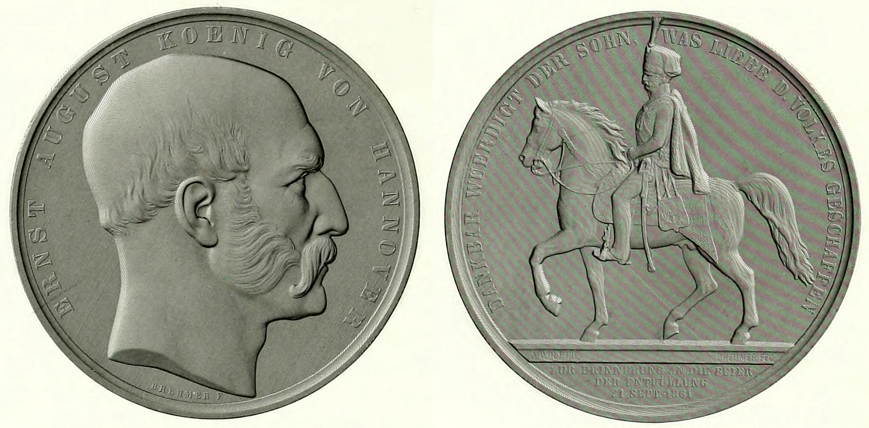 Zu Illustrationszwecken neu zusammengestellte Ausschnitte einer Seite aus dem Ernst August Album. Die Gedenk-Medaille auf die Einweihung des Ernst-August-Denkmals in Hannover zu Ehren des verstorbenen Landesherrn des Königreichs Hannover, König Ernst August, zeigt auf der einen Seite das Reiterstandbild und auf dem Avers den Kopf des Herrschers nach rechts, am Halsabschnitt die Signatur "BREHMER. F." sowie die Umschrift "ERNST AUGUST KOENIG VON HANNOVER". Auf dem Revers findet sich das Reiterstandbild des Königs, am Sockel die Inschrift A. WOLF. INV., daneben BREHMER. FEC, darunter: „ZUR ERINNERUNG AN DIE FEIER DER ENTHÜLLUNG 21 SEPT. 1861.“ Die Umschrift: „DANKBAR WUERDIGT DER SOHN, WAS LIEBE D. VOLKES GESCHAFFEN“ Die hier gezeigten Abbildungen geben - wohl auch aufgrund eines nur halbwegs hochaufgelösten Scans - leider nicht die differenzierte Ausformulierung der originalen Medaille wieder; vergleiche beispielsweise die Abbildungen eines Auktionshauses unter [1] ...